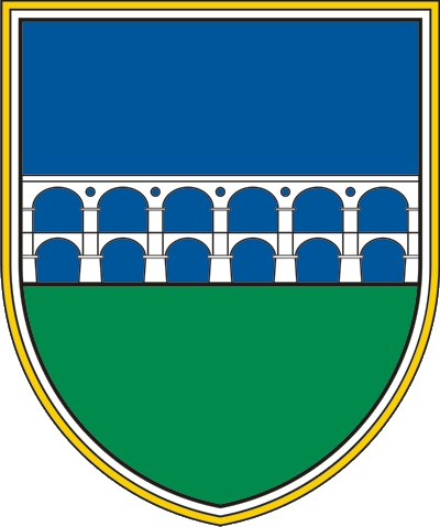 Grb Občine Borovnica